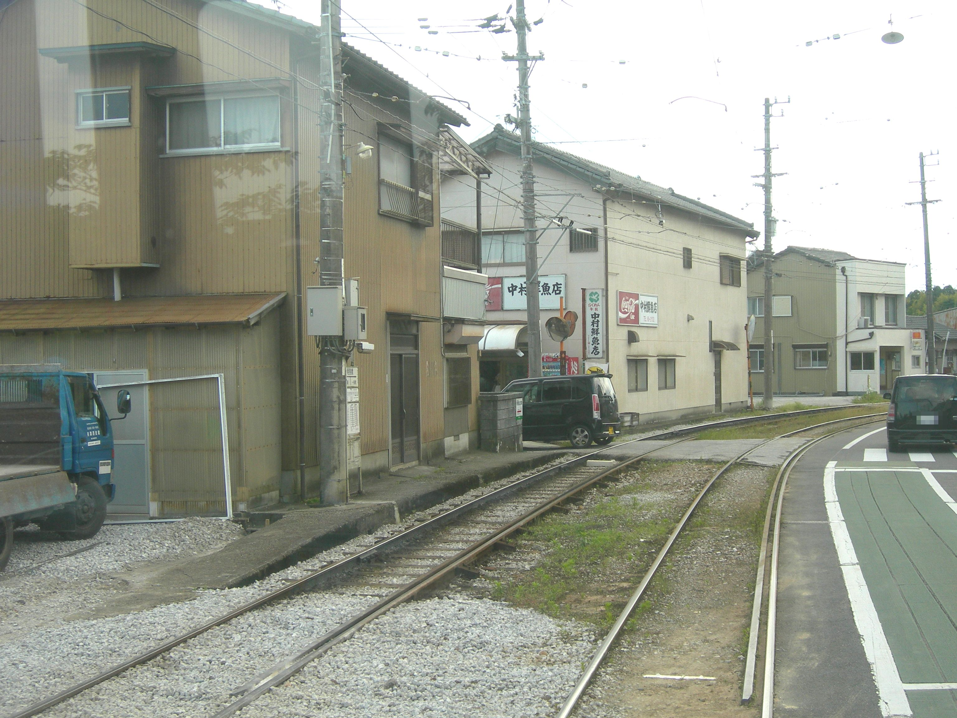 土佐電気鉄道・明見橋電停。